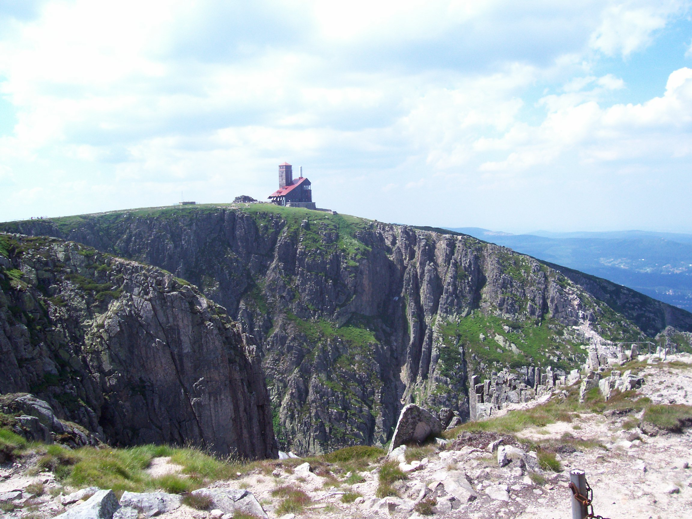 Stacja radioprzekaźnikowa na śnieżnych kotłach (Karkonosze, Polska)